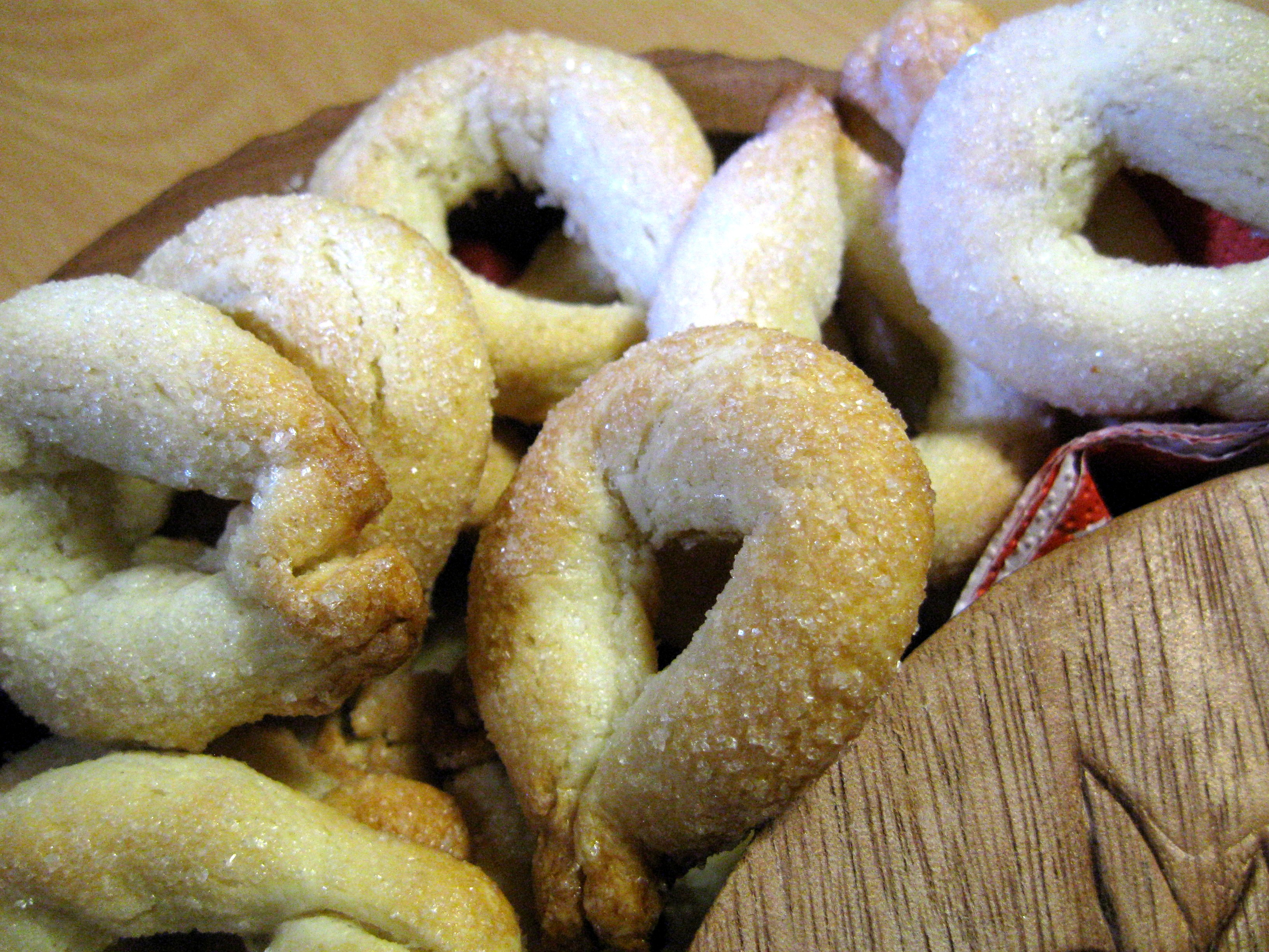 Torcetti di Saint-Vincent fatti in casa. Link alla ricetta